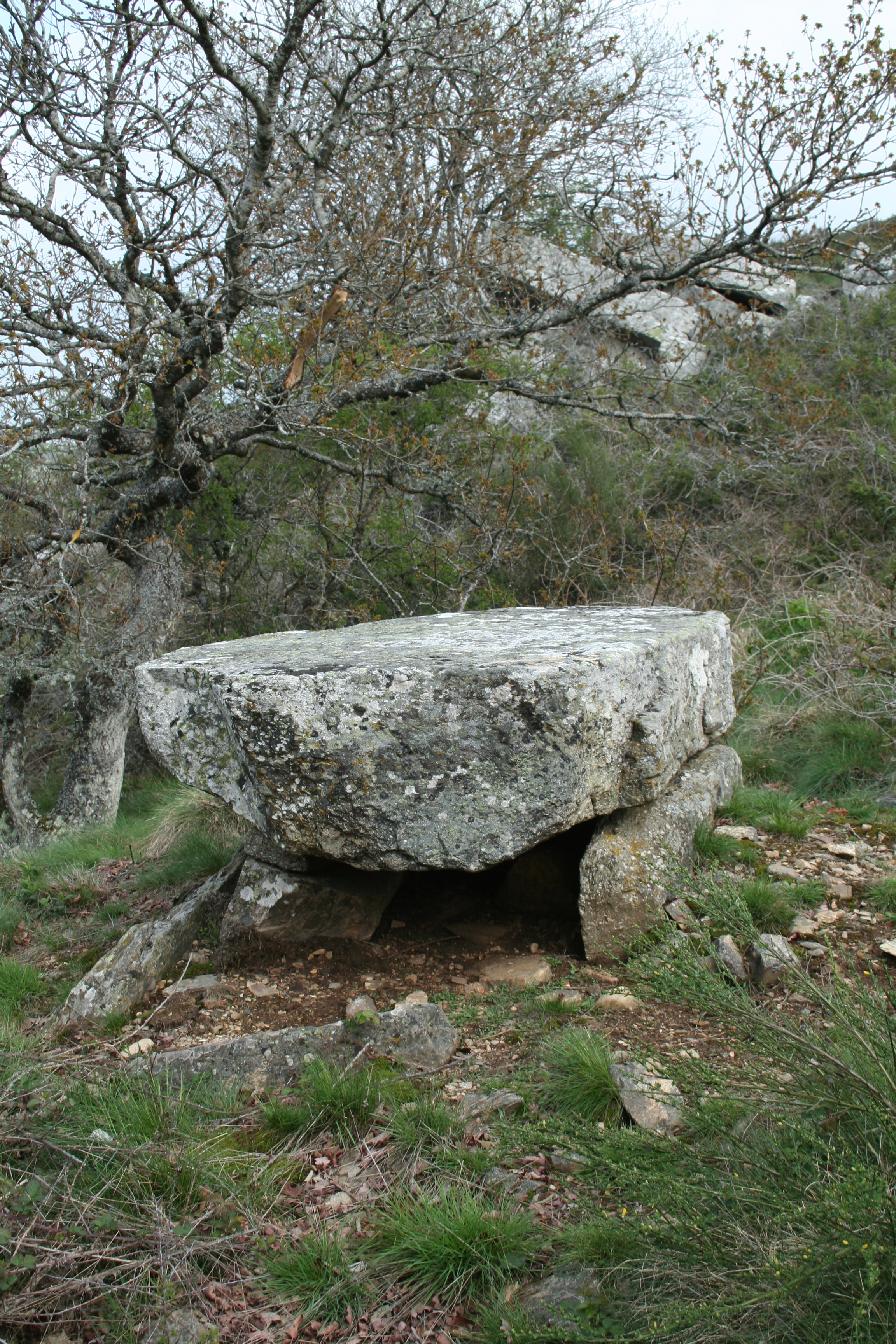 Murat-sur-Vèbre (Tarn) - dolmen de la Gardia (vue de profil).